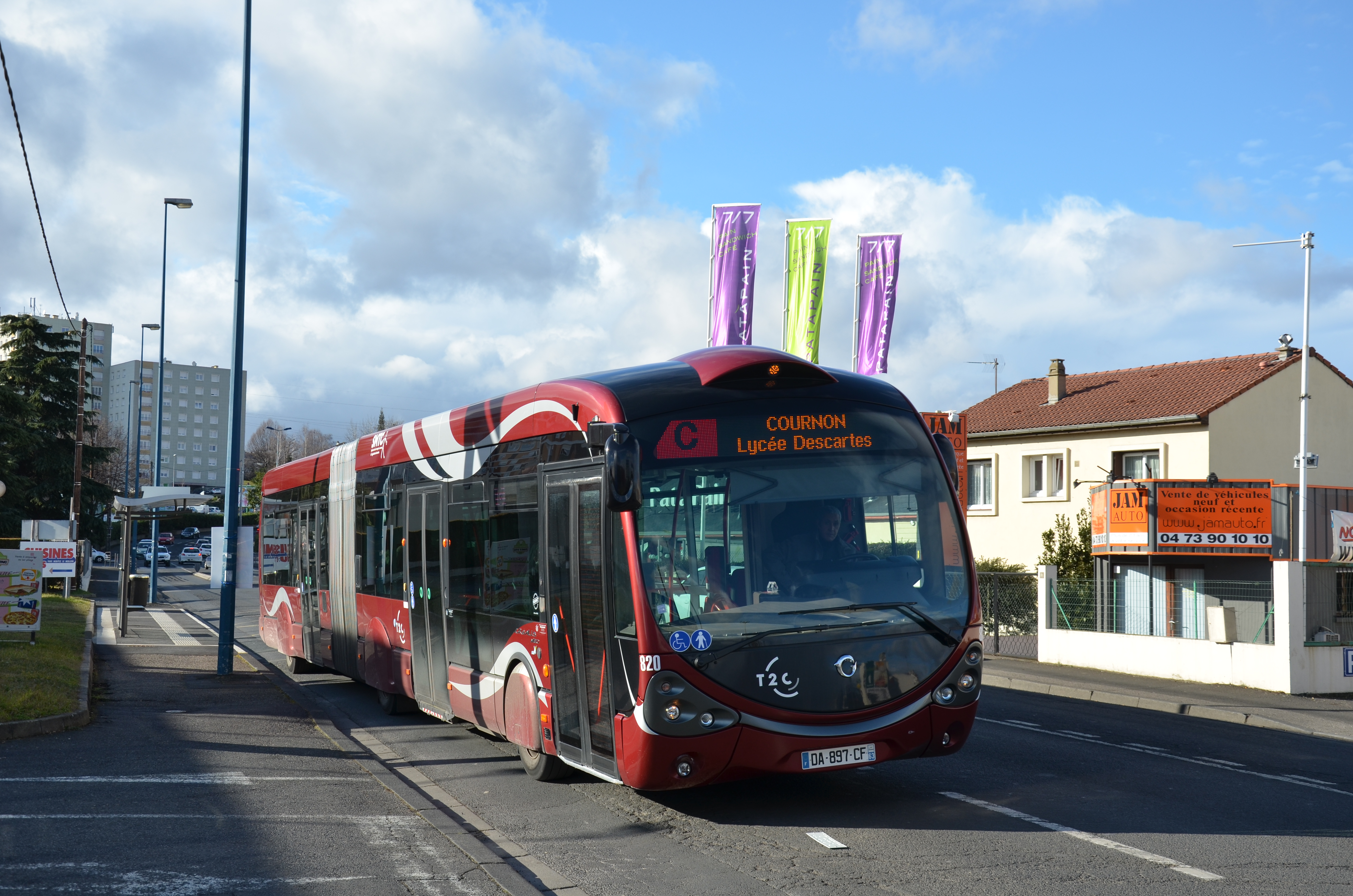 Irisbus Crealis Neo 18 n°820 de la ligne C du réseau T2C de Clermont Ferrand, près de l'arrêt Oradou Gantière.